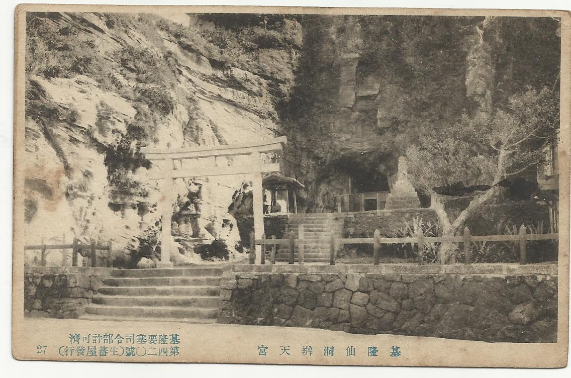 基隆仙洞辨天宮即現今仙洞巖，當時是一座神社。 基隆要塞司令部許可済 第四二O號(生蕃屋發行) 27